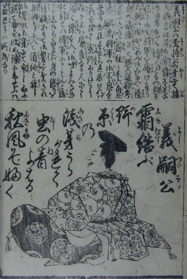 asikaga yoshitsugu